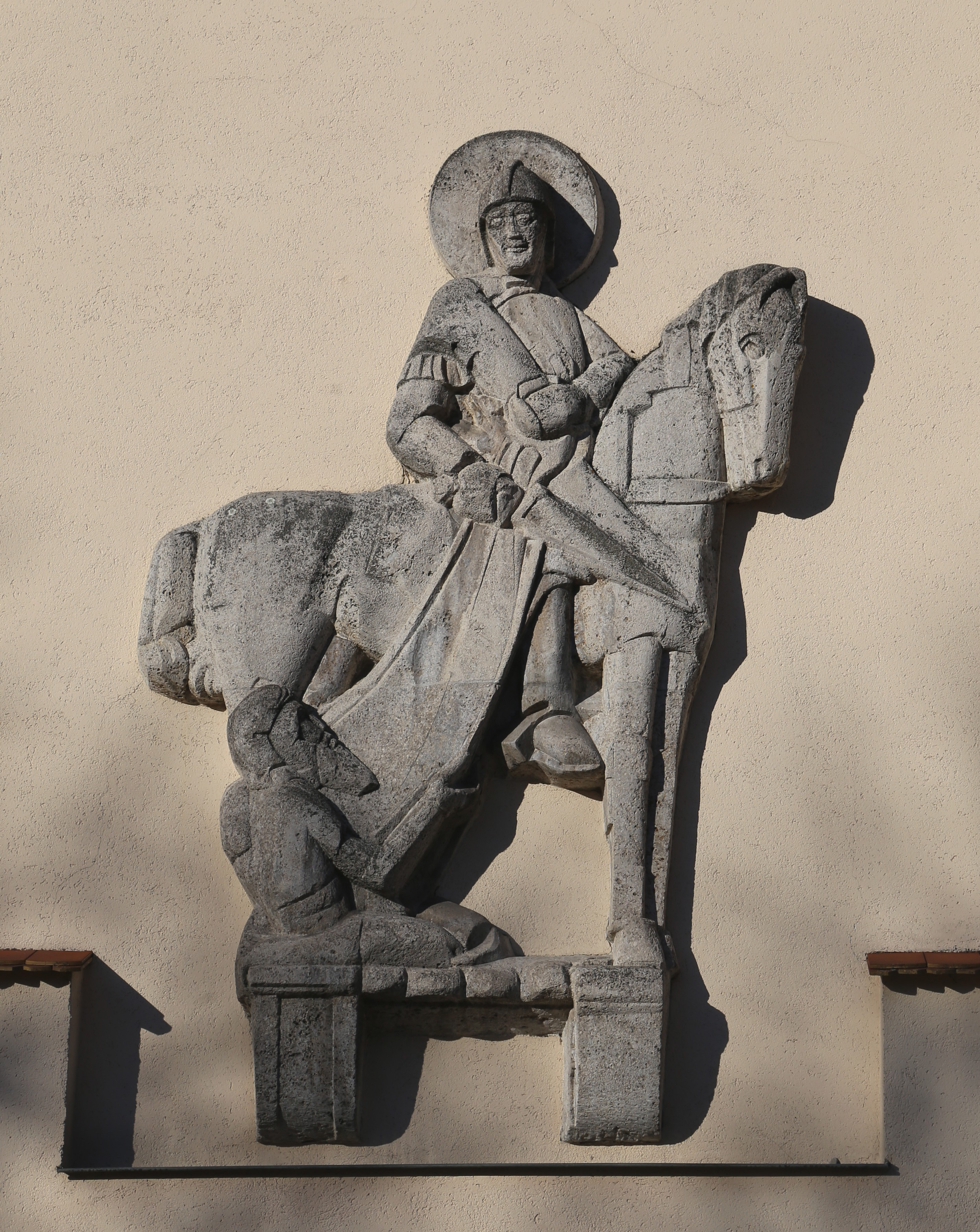 Skulptur von Karl Knappe über dem Hauptportal der Neuen Pfarrkirche St. Martin in Moosach, München.